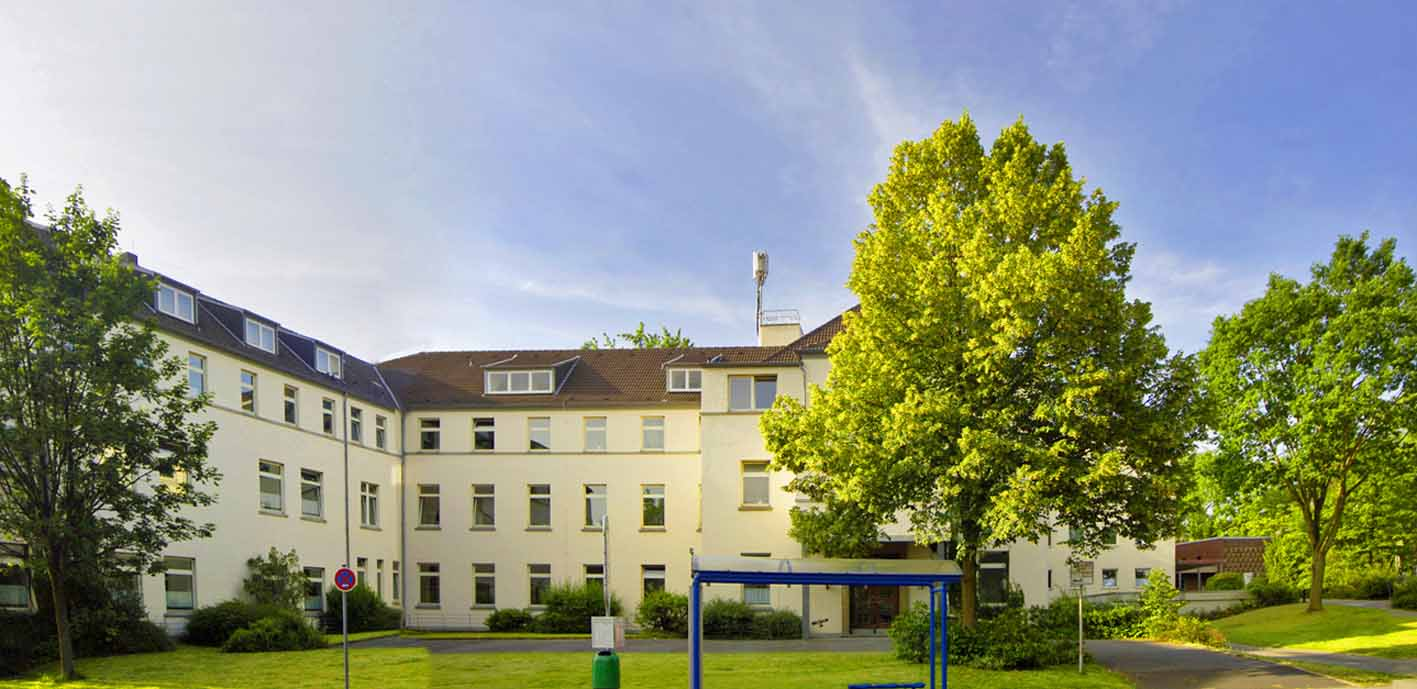 Außenansicht des St.-Elisabeth-Krankenhauses Hattingen-Niederwenigern